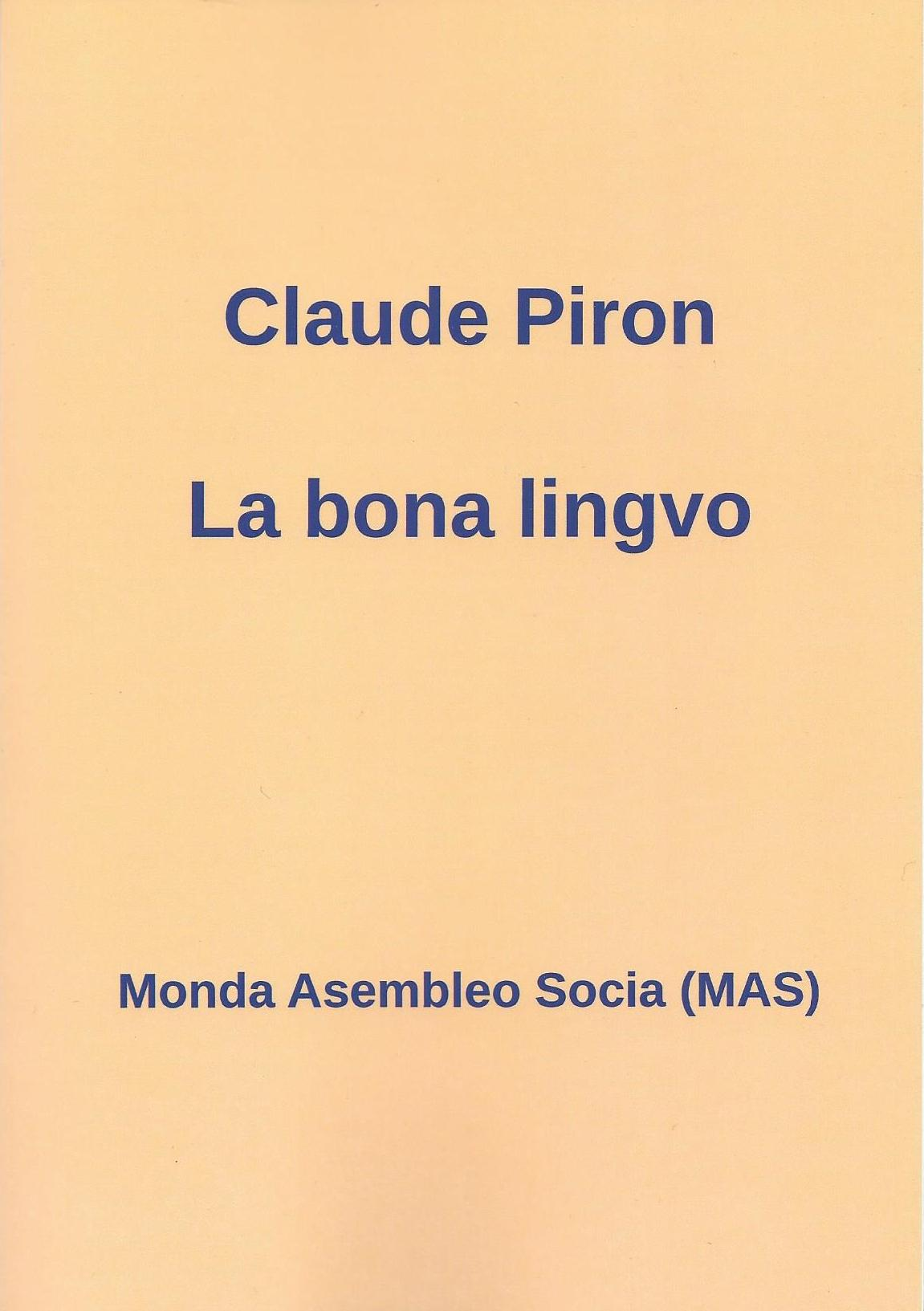 librokovrilo de libro "La Bona Lingvo", 2015